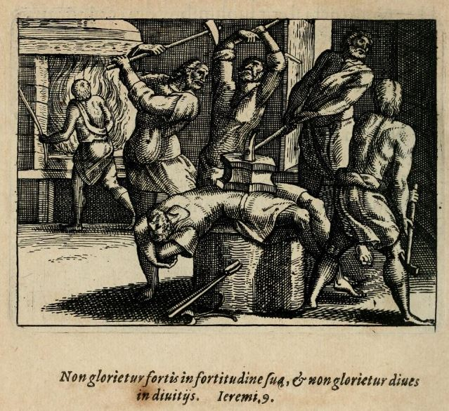 la: Non glorietur fortis in fortitudine sua et non glorietur dives in divitiis su Let the mighty man not glory in his might, nor the rich man glory in his riches